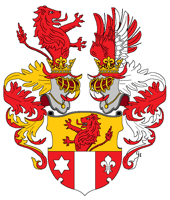 Wappen des österreichischen Internisten Dr. Norbert Ortner (1865–1935), verliehen anlässlich seiner Erhebung in den österreichischen Ritterstand mit dem Prädikat "von Rodenstätt" 1916. Zeichnung von Gerd Hruška ( Für weitere Informationen zu dieser Standeserhebung siehe (